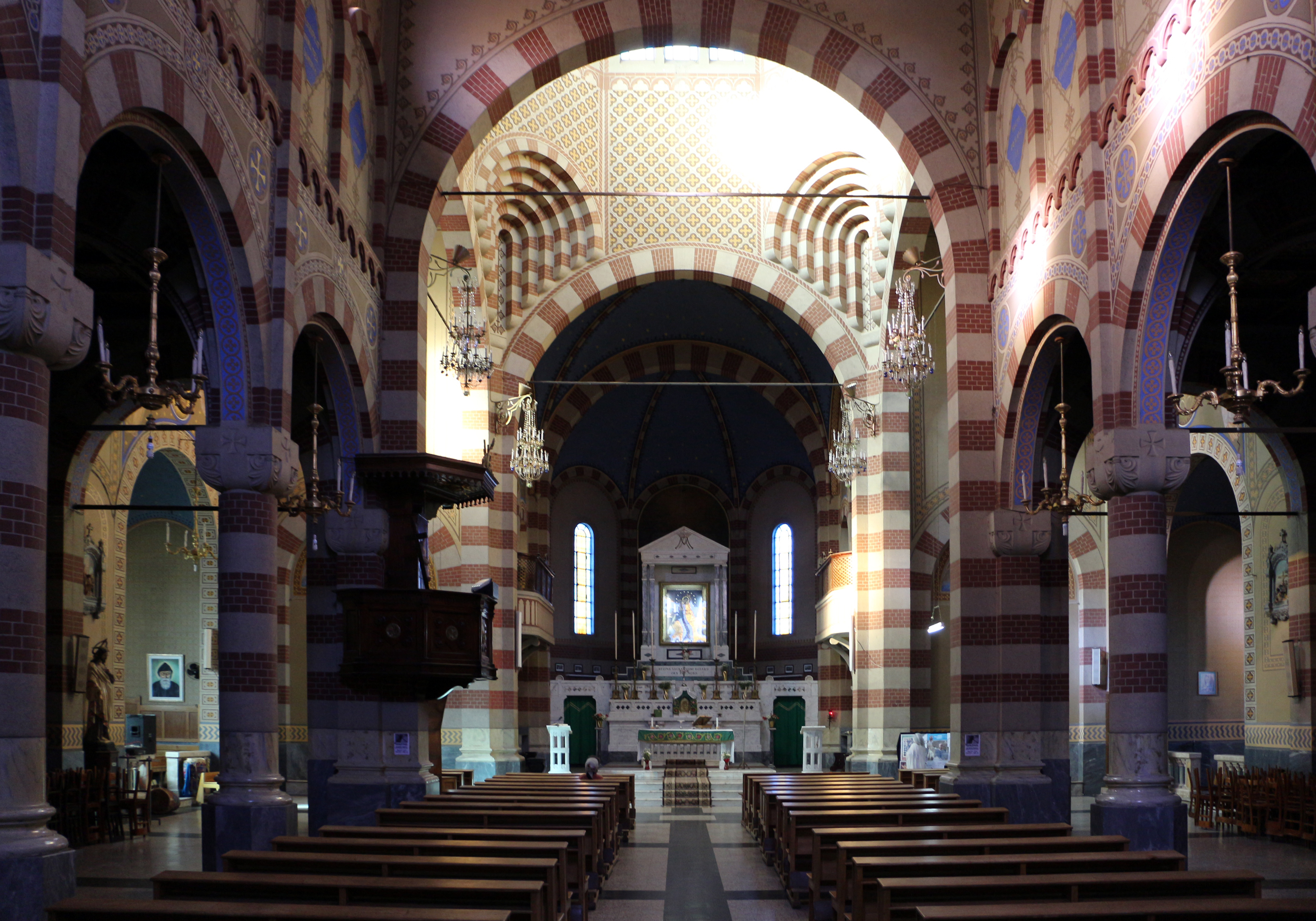 Asmara, cattedrale cattolica, interno 02.JPG